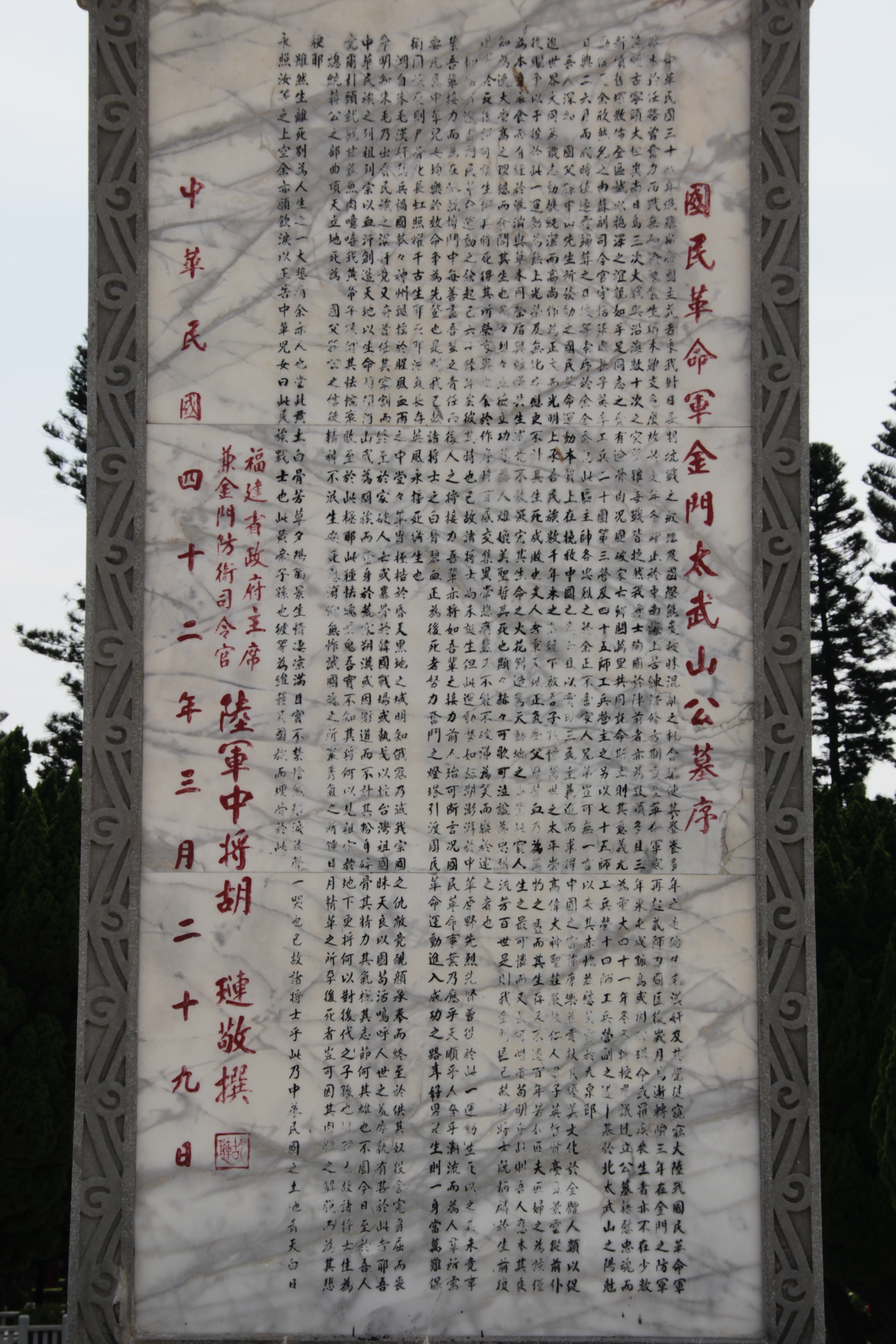 中文（台灣）: 國民革命軍金門太武山公墓序，1953年（中華民國42年）3月29日福建省政府主席兼金門防衛司令官胡璉撰。